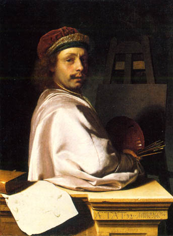 Self-portrait